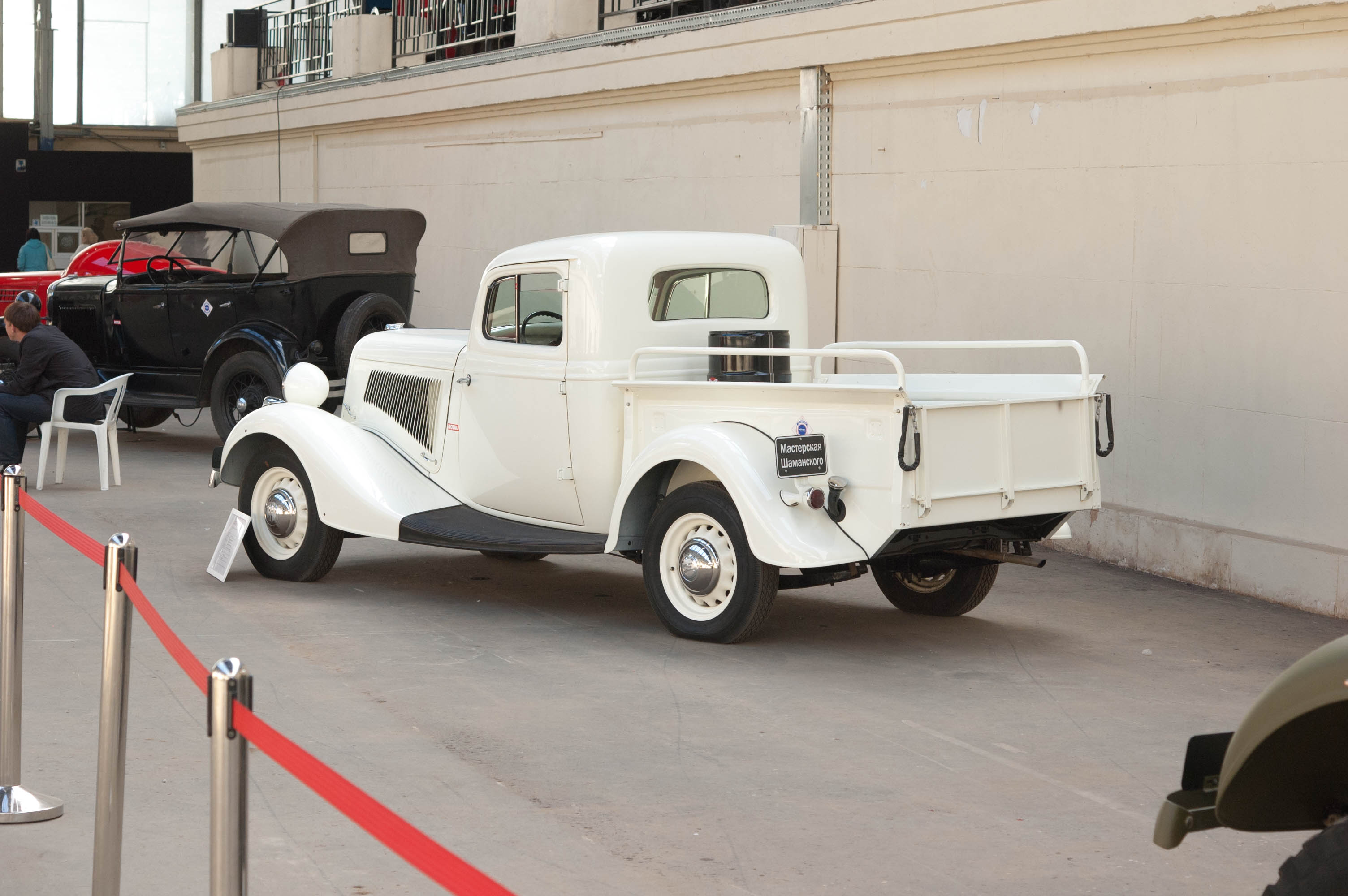 Пикап, грузовой вариант «Эмки» М-1.